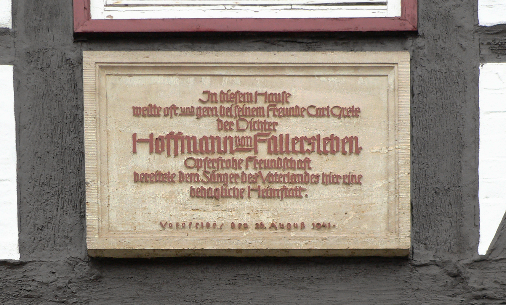 Vorsfelde, Langestrasse 36, Tafel am Gretehaus